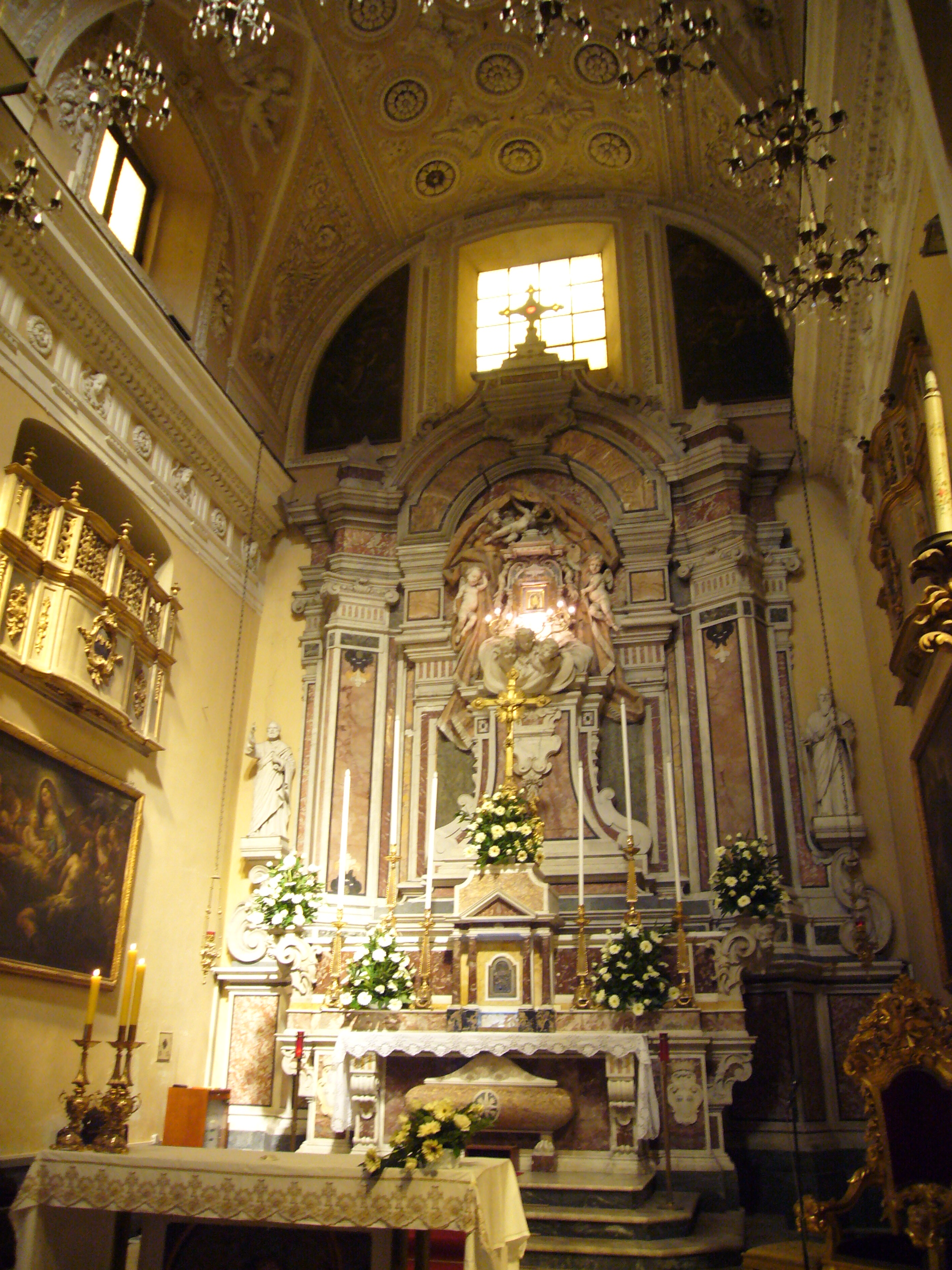 Napoli, Santa Maria in Portico a Chiaia: altar maggiore